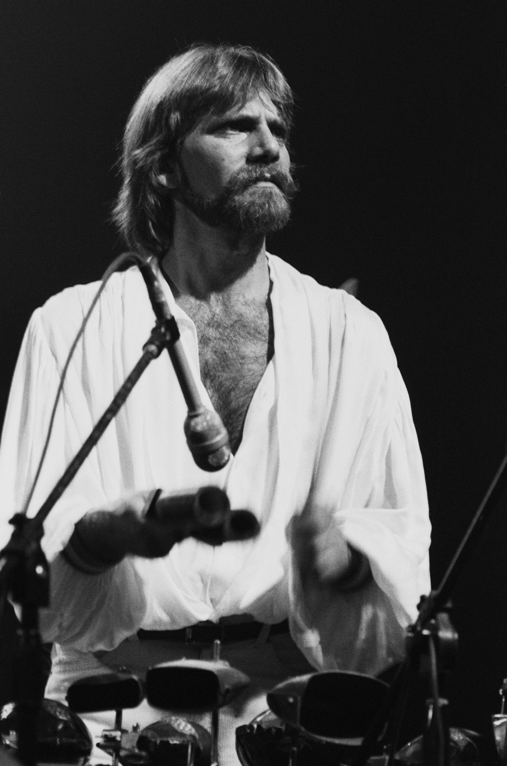 Il musicista Tony Esposito durante un concerto dei primi anni '80